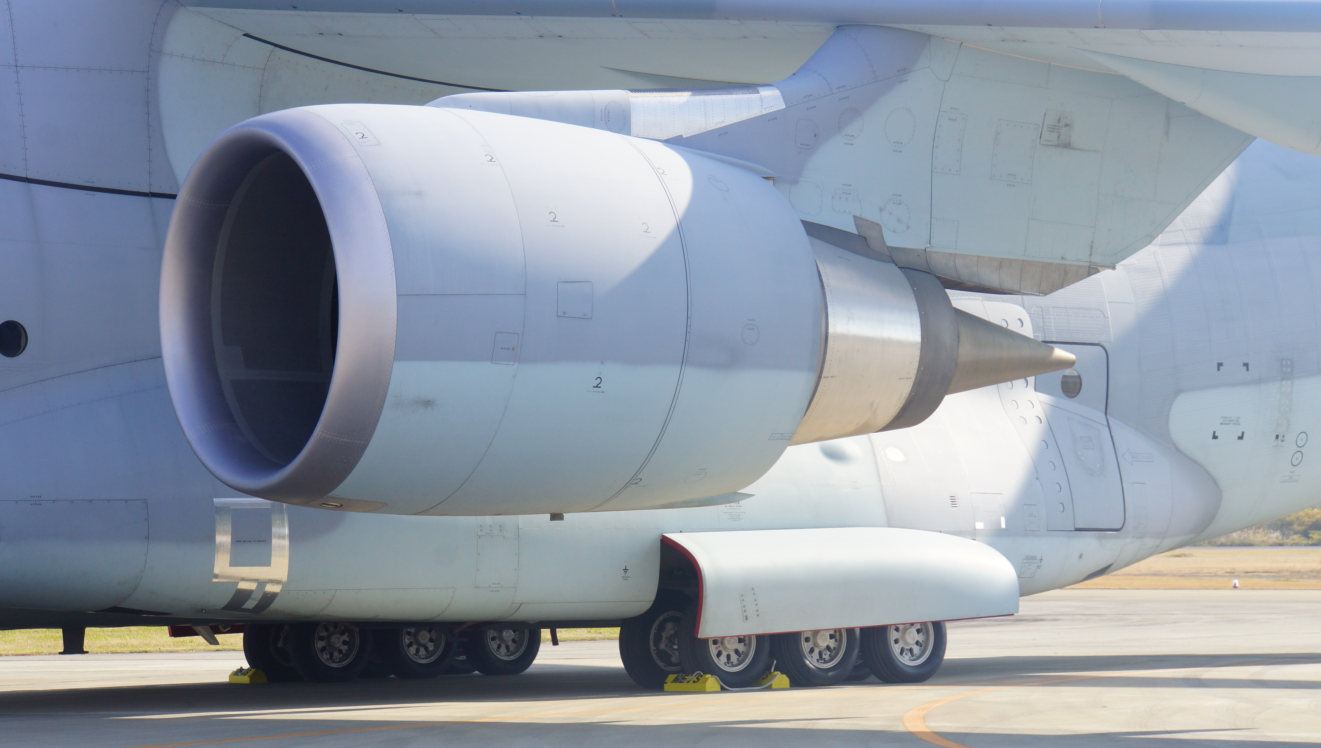 航空自衛隊 XC-2輸送機（18-1202号機） CF6-80C2K1Fエンジン。 14年11月23日 航空自衛隊岐阜基地にて。